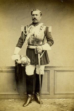 Arnaud Ernest Junqua (1816-1893), commandant en second de l’escadron des Cent-Gardes, en uniforme de cuirassier avec l’épée des Cent-Gardes.